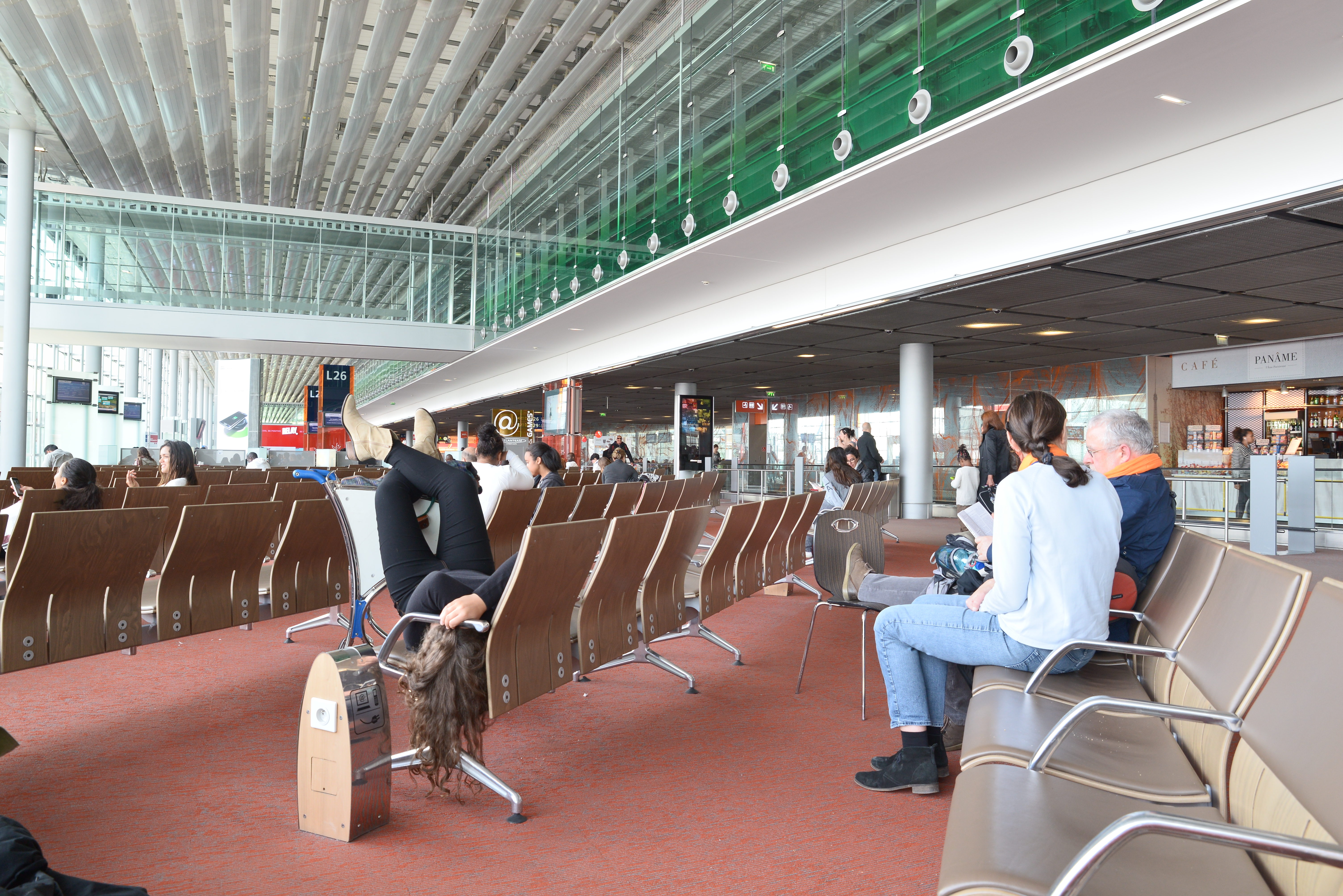 Hall L du terminal 2 de l'aéroport de Paris Charles de Gaule